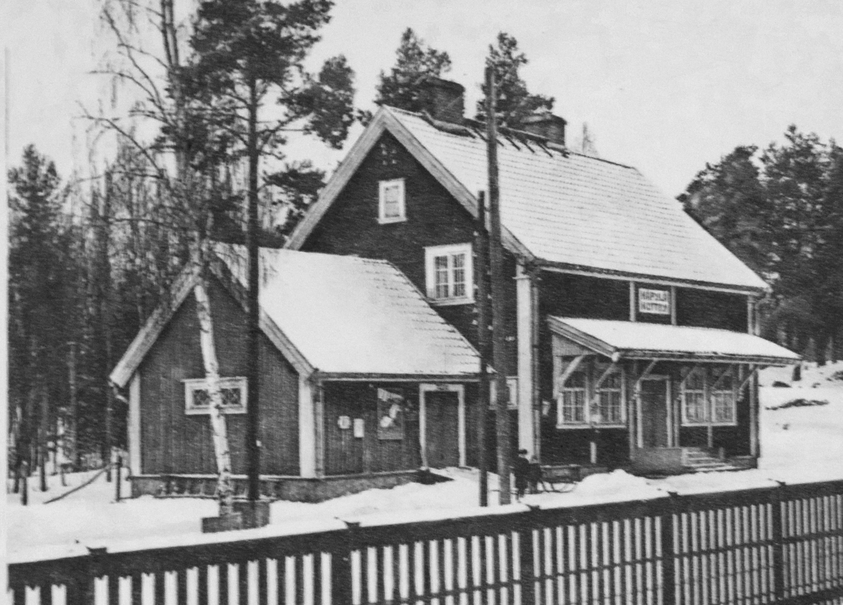 Käpylän vanha rautatieasemarakennus.